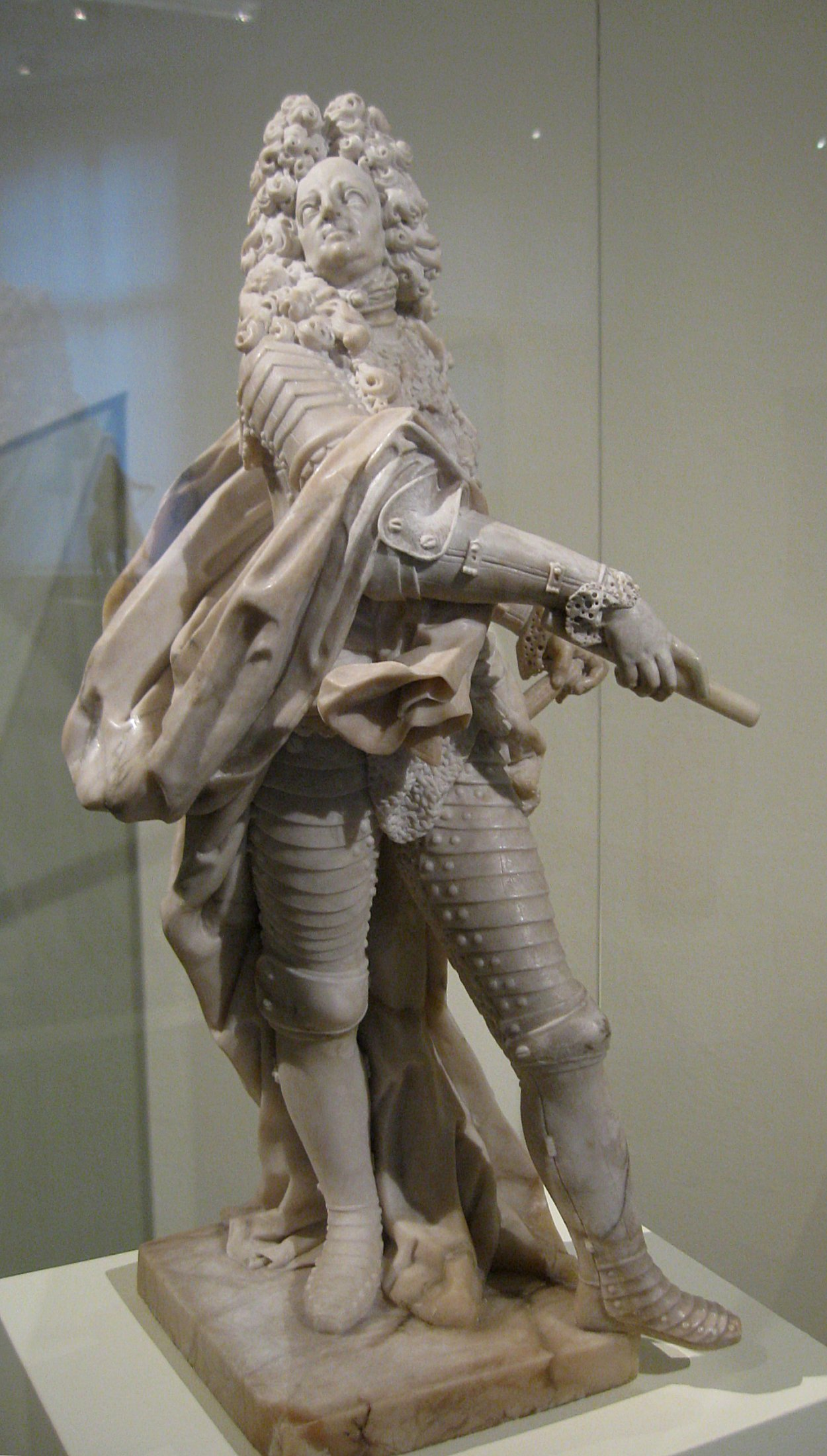 Giuseppe Volpini: Kurfürst Max Emanuel, um 1720, Alabaster, Bayerisches Nationalmuseum in München